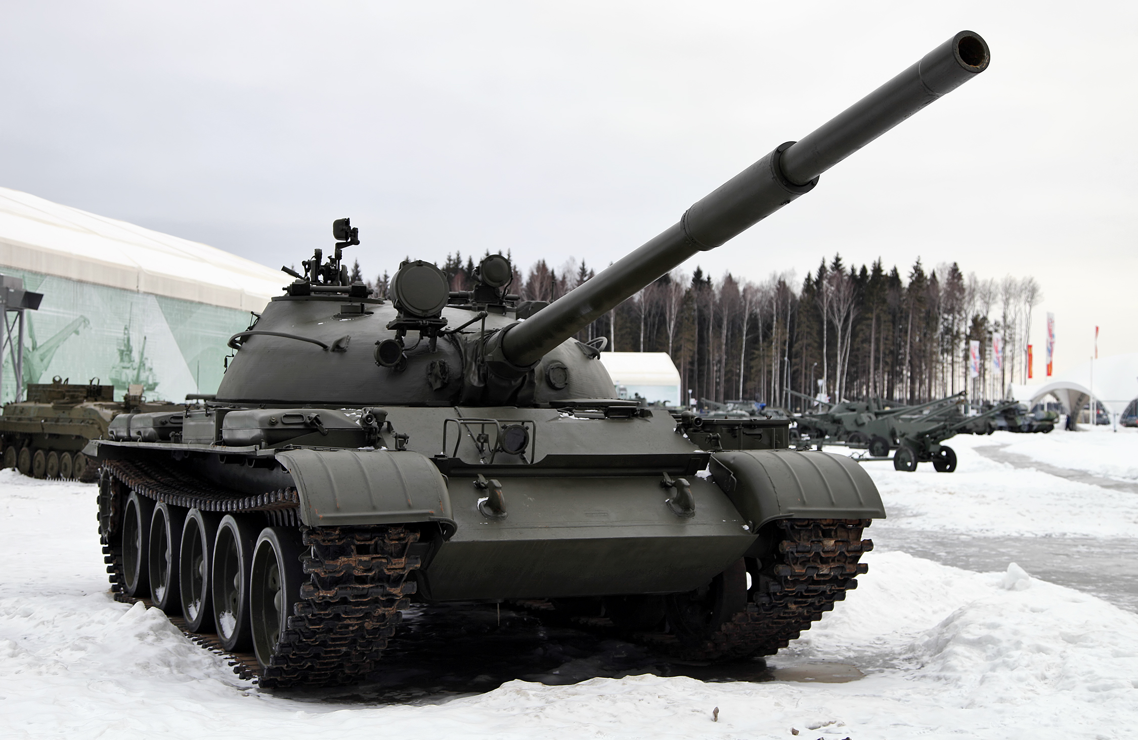 Т-62 образца 1972 года.